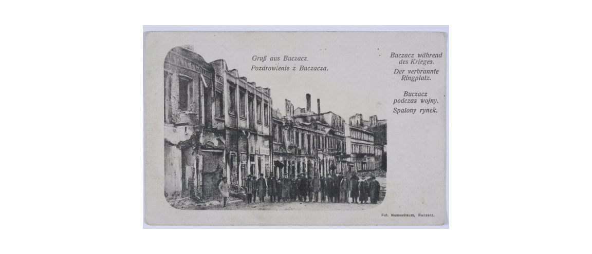 Бучач під час війни, 1916 рік. Спалений ринок